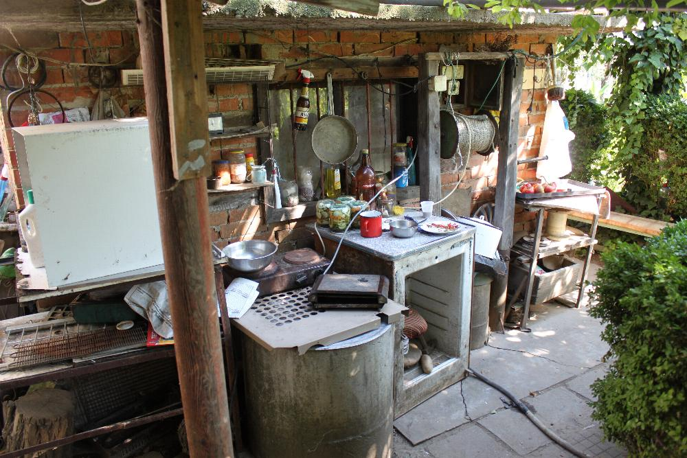 Sommerküche auf einem bulgarischen Dorf